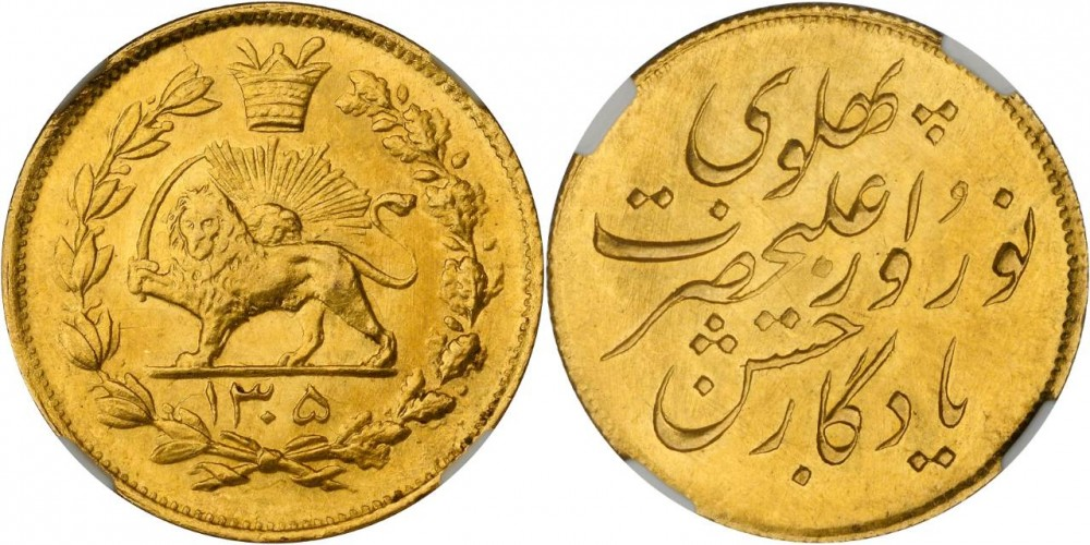 سکه یک تومان رضا شاه پهلوی که به مناسبت نوروز در سال ۱۳۰۵ خورشیدی ضرب شده است. آخرین سکه یک تومانی که با الگوبرداری از سکه های یک تومانی قاجار تهیه شده است. بعد از ضرب این سکه، سکه های طلای پهلوی جایگزین سکه های طلا در واحد تومان گردید.